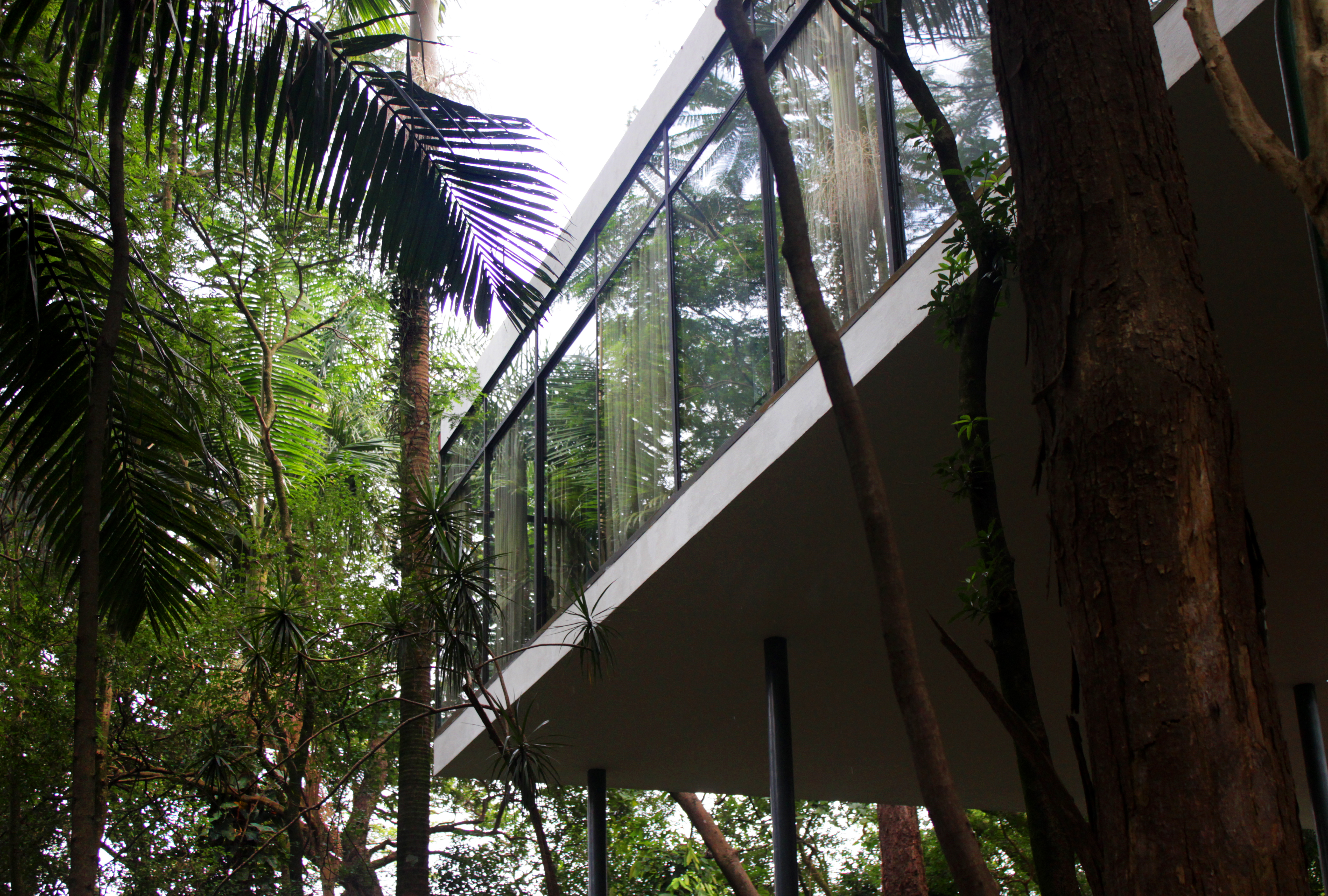 Casa de Vidro, sede do Instituto Lina Bo Bardi, à Rua General Almerio de Moura, nº200, no Bairro do Morumbi